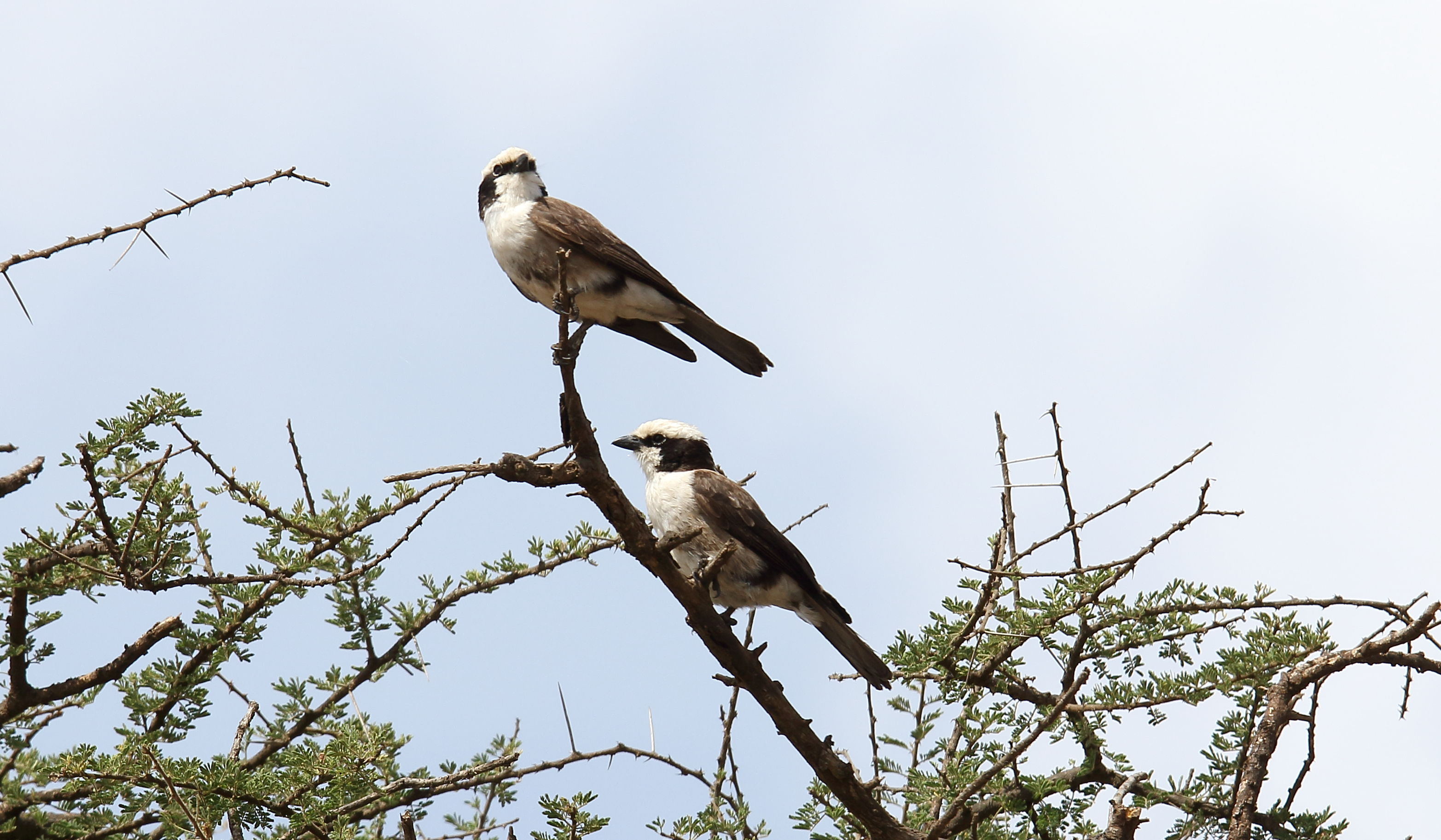 White-rumped Shrike (Eurocephalus ruppelli)